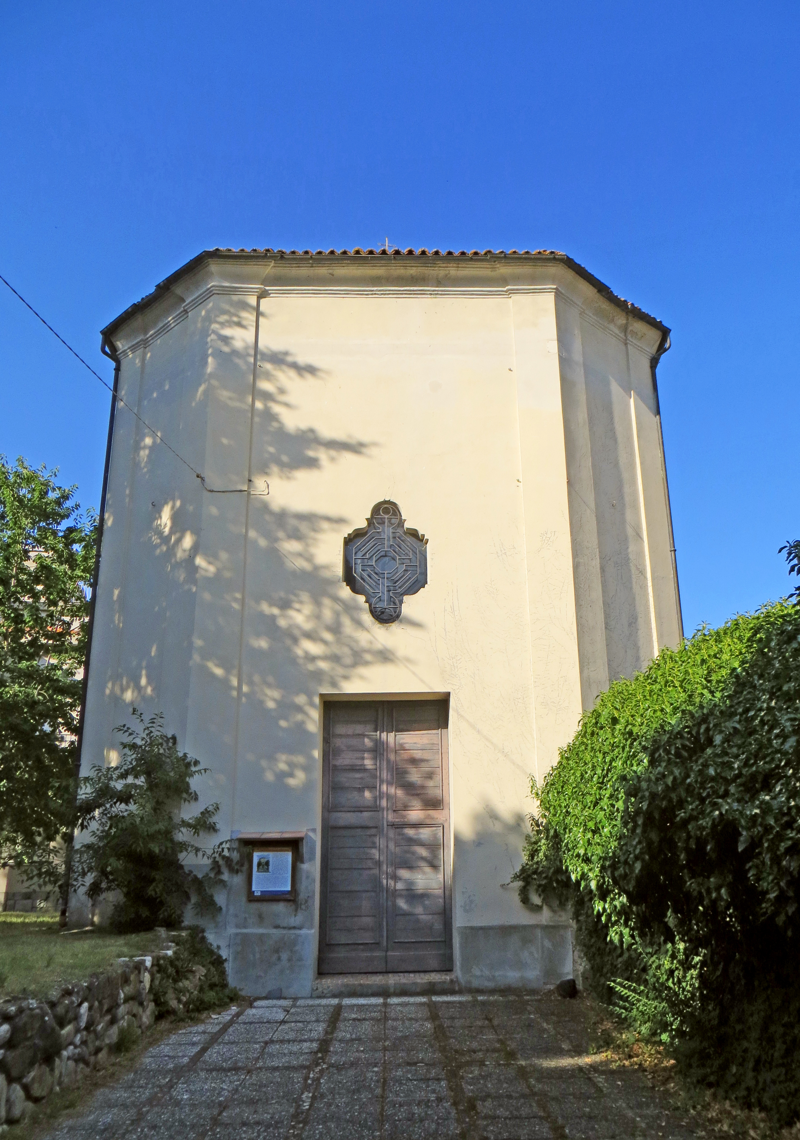 Oratorio dei Santi Filippo e Giacomo (San Vitale Baganza, Sala Baganza) - facciata